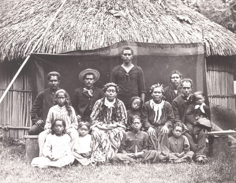 Famille de Pueu vers 1895. Photographie de G. Spitz.